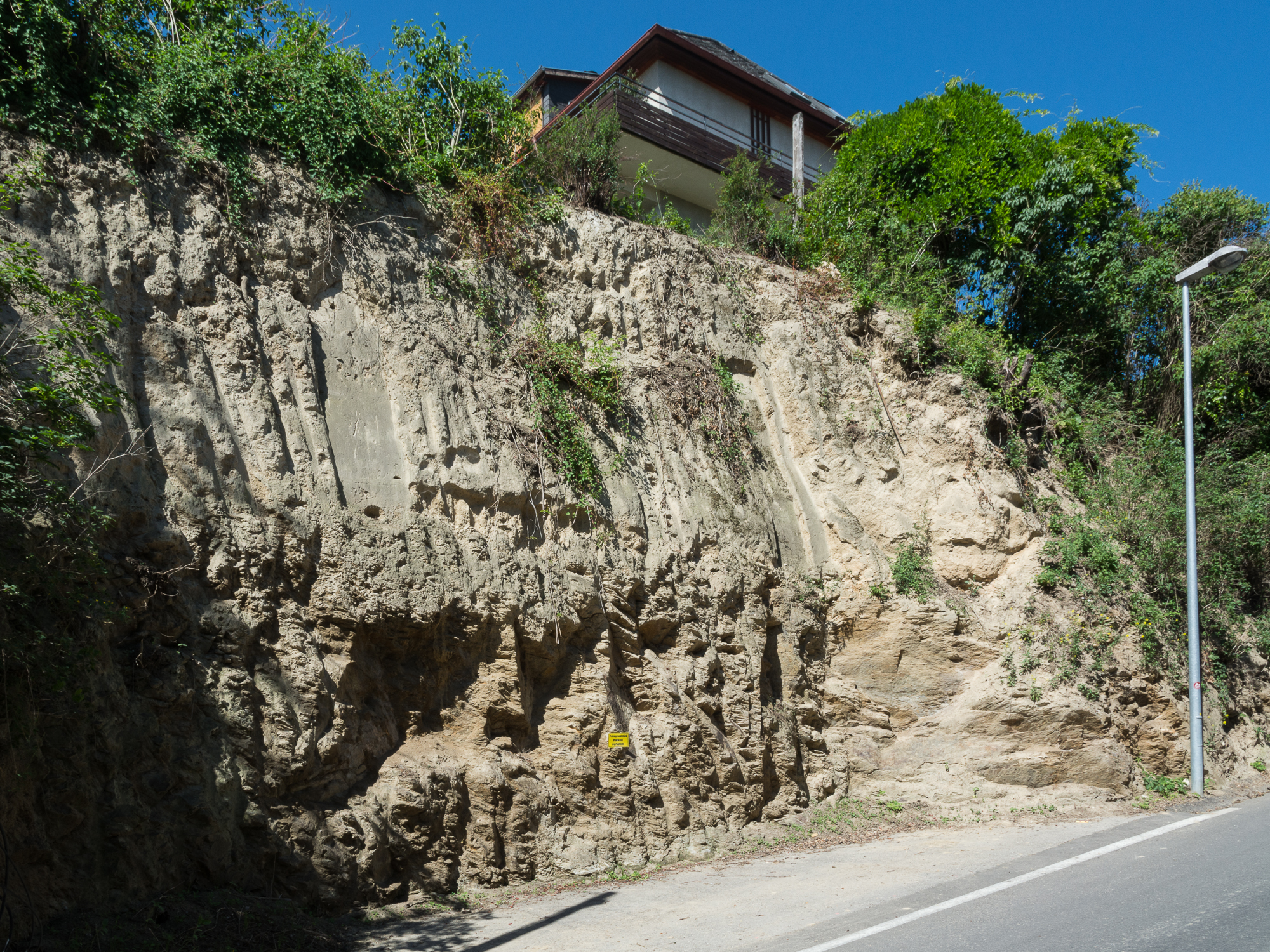 Lösswand über Böhmischer Masse, Schießstattgasse 3 (Parzellennummer 217/4) in Krems an der Donau, Niederösterreich. Das Haus wurde auf der Bayer-Grabung von 1930 errichtet.